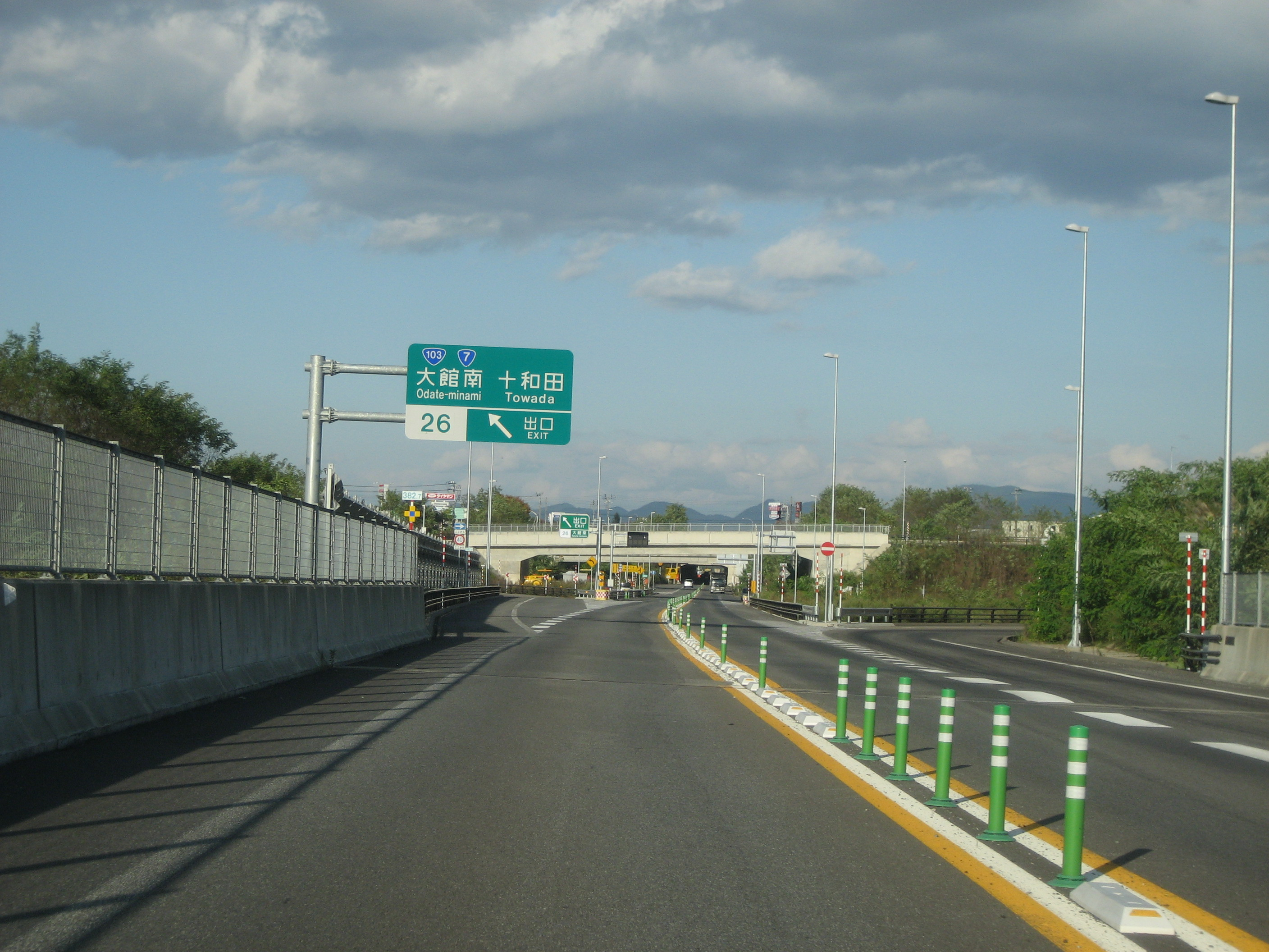 大館南IC大館北IC方面出口付近